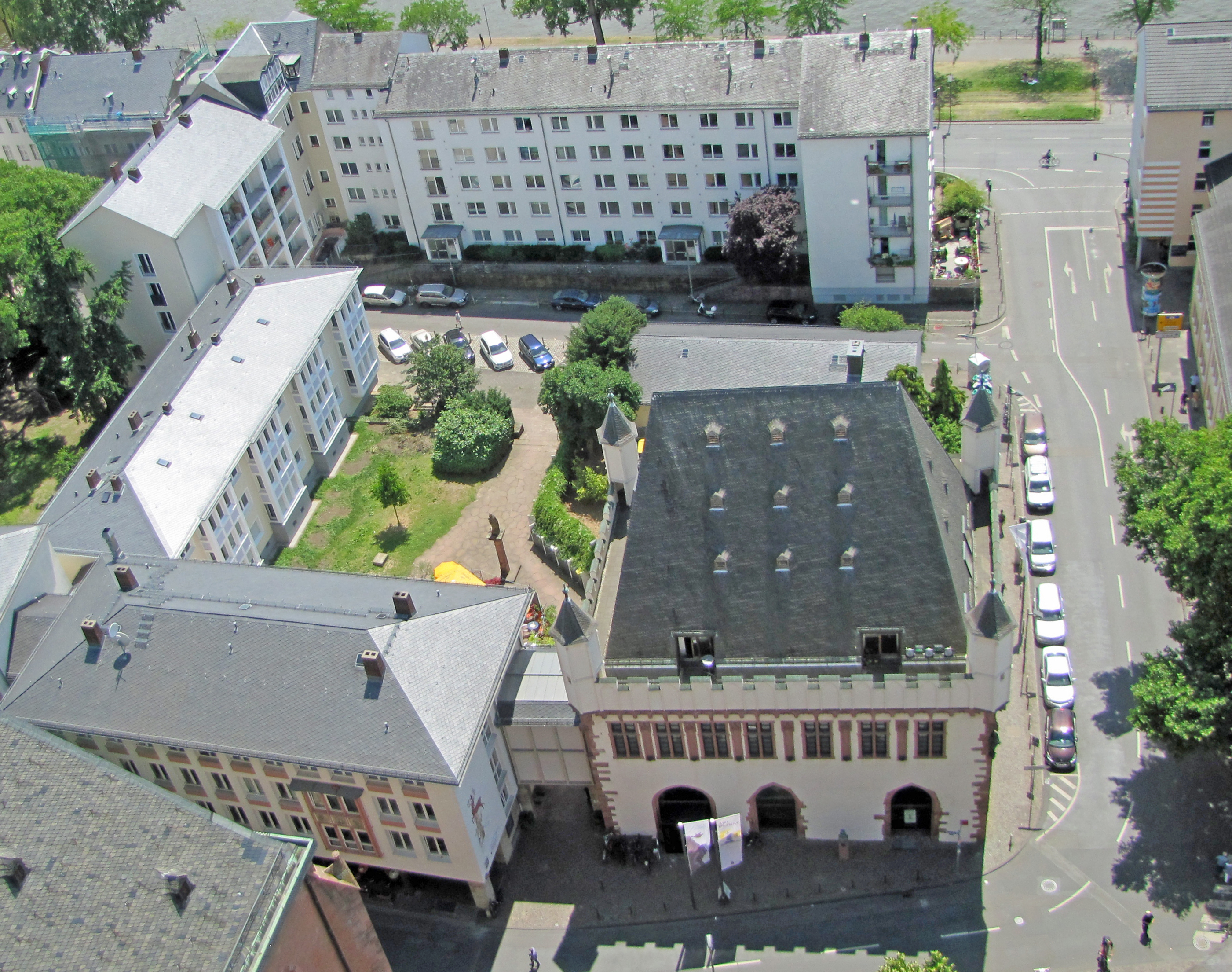 Das Leinwandhaus (und Caricatura_Museum) vom Domturm aus, im Juni 2017 in Frankfurt am Main.